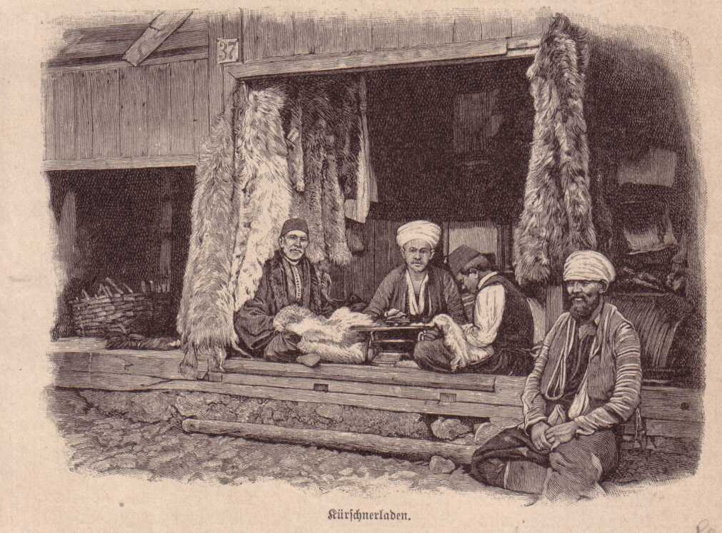 Oriental Furriers'shop